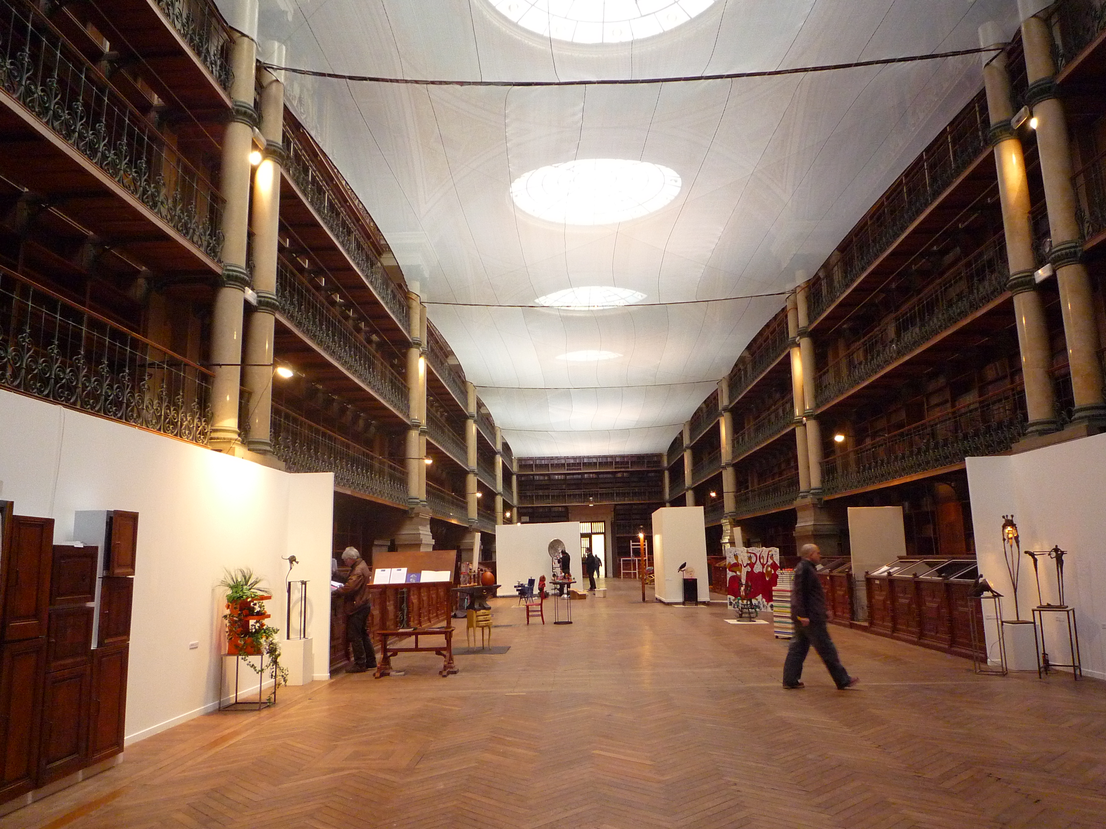 Salle ancienne bibliothèque reconvertie en salle d'expositions temporaires. Ancien musée-bibliothèque de Grenoble (1872).